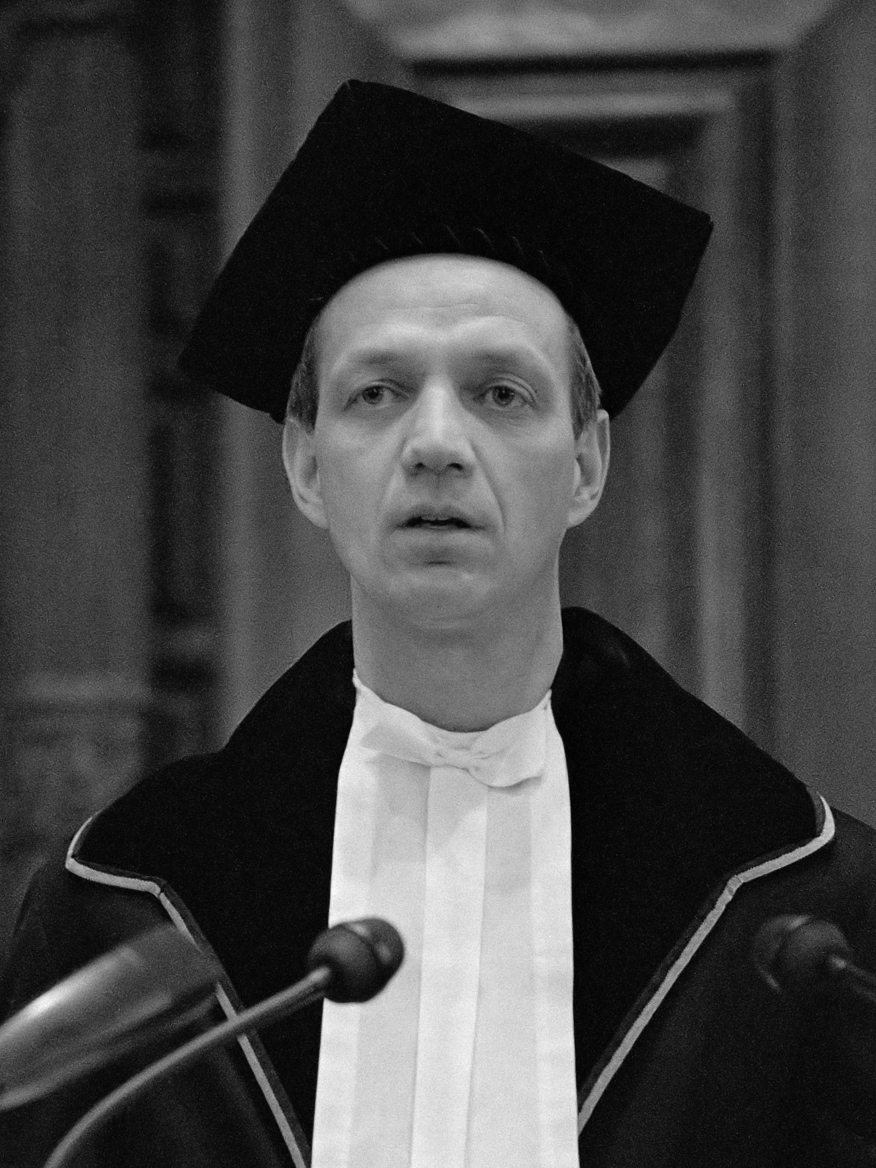 Professor dr. Lucas Reijnders houdt een rede ter gelegenheid van zijn aanvaarding van het ambt van hoogleraar in de mileukunde aan de Universiteit van Amsterdam 13 februari 1989